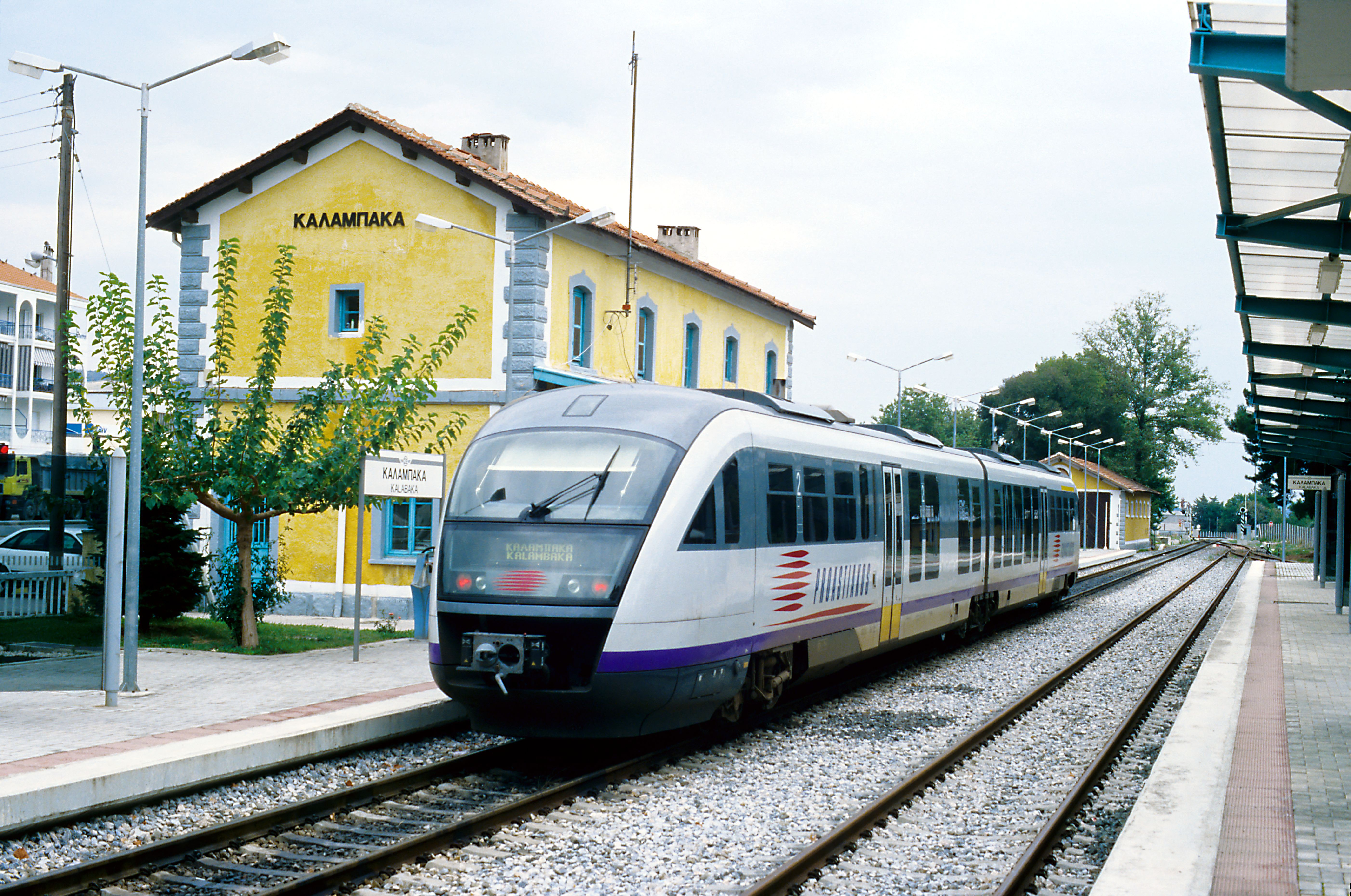 Einer der geliehenen und für Bulgarien bestimmten Desiro-VT, bei der OSE als BR 660 eingeordnet, im Bahnhof Kalambaka nach der Umspurung. Die Lage der größeren Bahnhöfe der Strecke Paläofarsalos–Kalambaka sowie die der letzten Kilometer vor Kalambaka hat sich beim Umspuren nicht wesentlich verändert, die Betriebsführung ohne Signalisierung, Signalabhängigkeit und Streckenblock leider auch nicht.